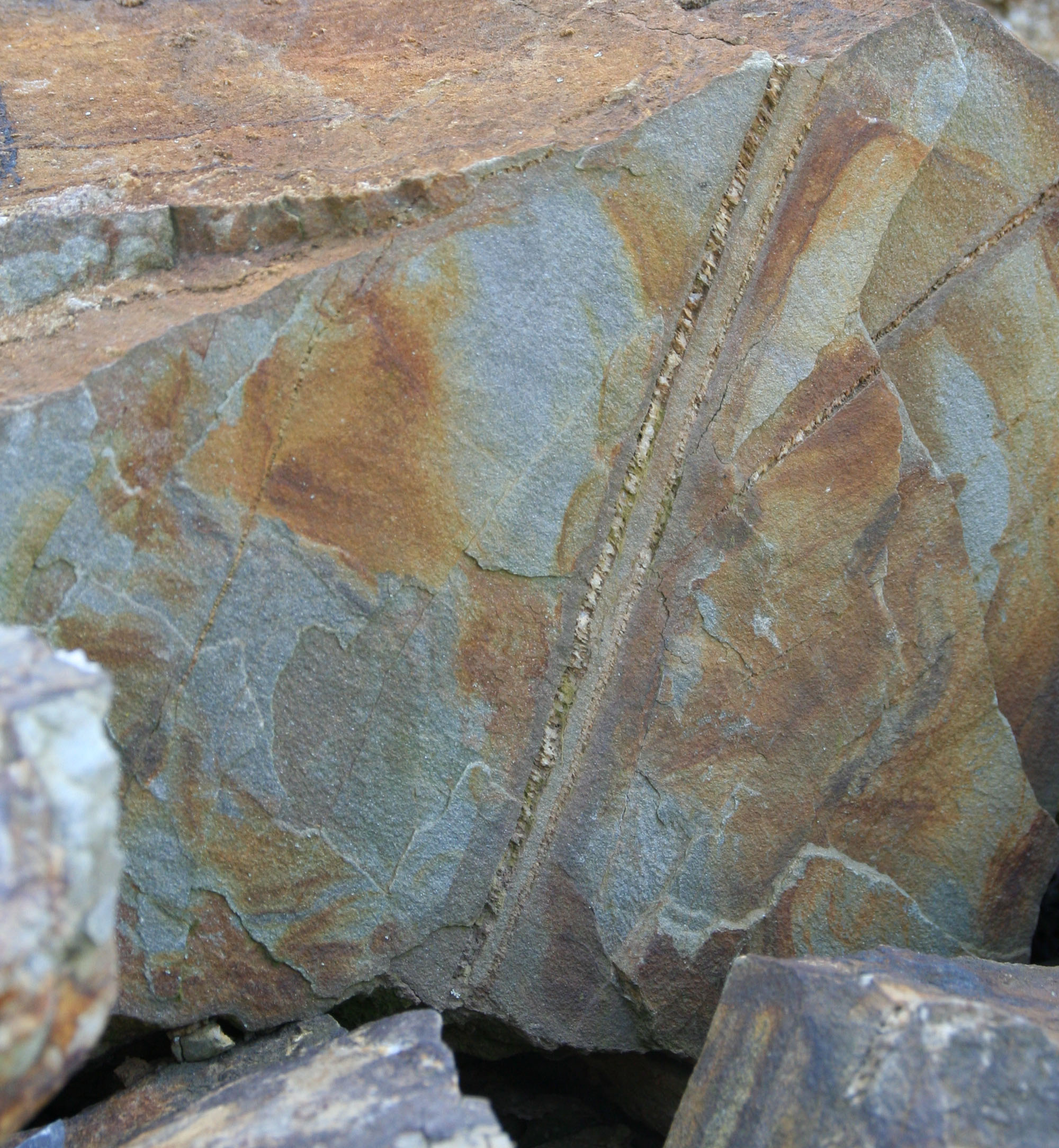 Géisdrefer Antimonäerz. Kategorie:Gemeng Géisdref Kategorie:Metaller